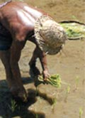 Reisanbau Setlinge setzen